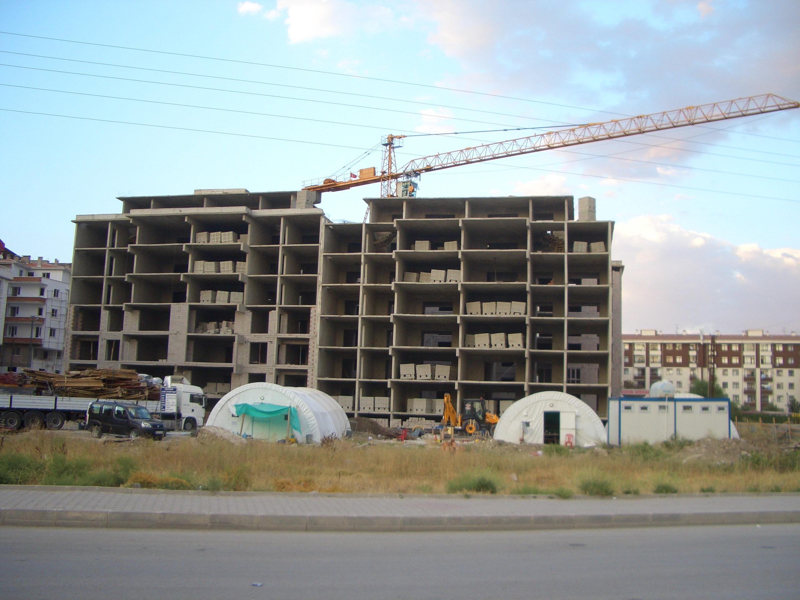 Bir sitenin inşaatı (Ankara, Etimesgut)